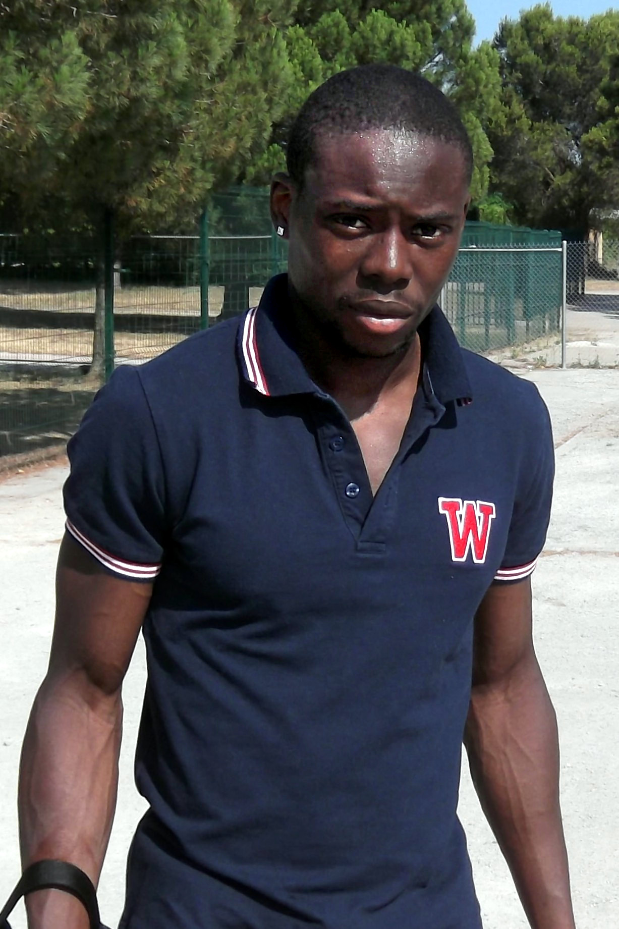 Jonathan Tinhan, juillet 2013.